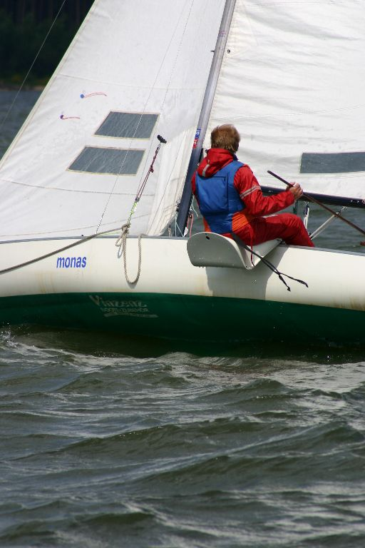 Monas auf dem Großen Brombachsee